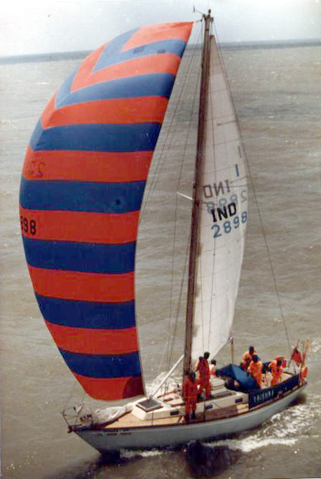 Trishna (yacht) training in Mumbai harbour. September 1985.